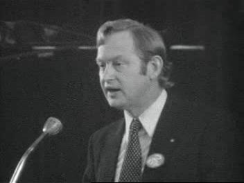 Frans Andriessen tijdens de verkiezingscampagne in 1972